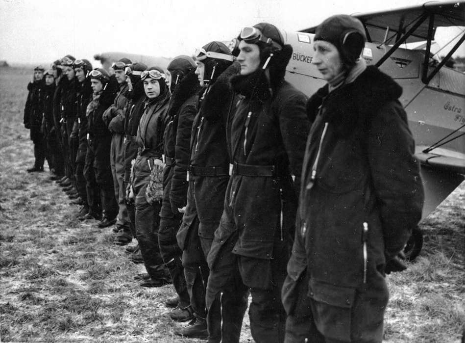 Flygskolans fjorton elever samlade framför flygplanen vid ordergivningen.Eskilstuna, torsdag. Fjorton flygbitna ungdomar, av vilka en har icke mindre än 100 flygtimmar bakom sig – han innehar A:1-certifikat – och en är ren nybörjare, drillas nu som bäst vid den centrala flygskolan på Ekeby flygfält utanför Eskilstuna av flygskolechefen, löjtnant Åke Lindahl, de tre lärarna Brink, Almlöf och Ossbahr samt chefsmekaniker Larsson och hans två medhjälpare Holmberg och Zetterqvist. Till skolans förfogande stå för närvarande två "Bücker-Jungmann", två "Klemm-35" och två "GV-38".